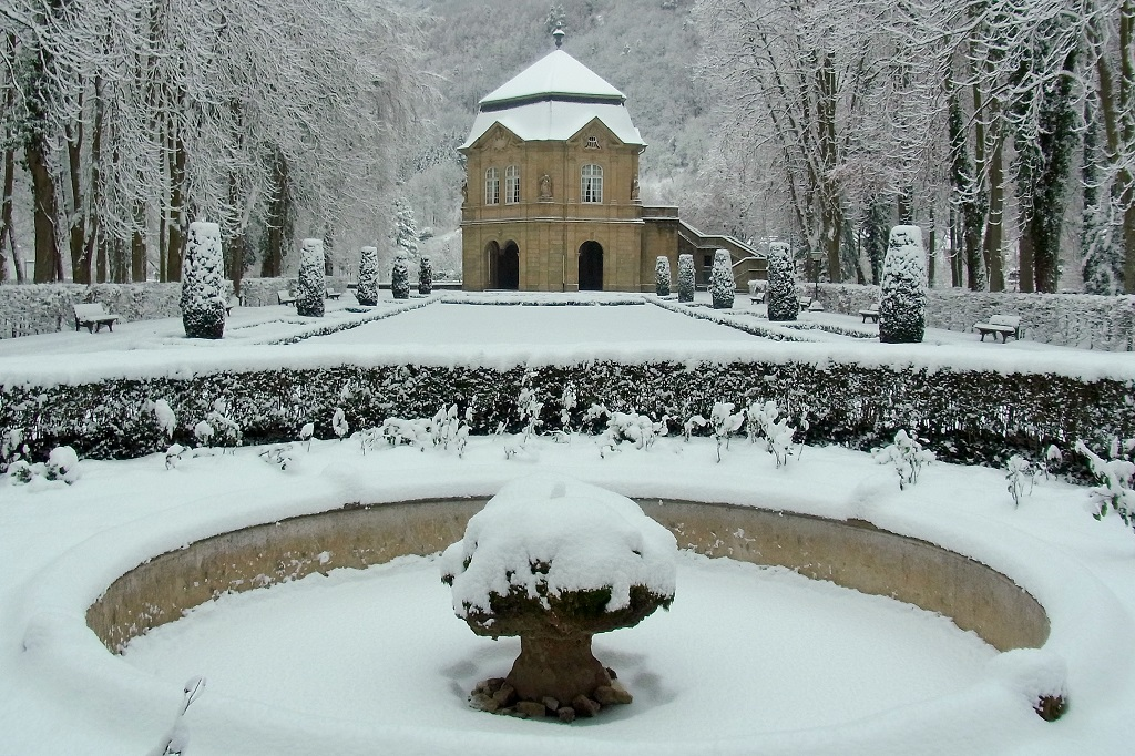 Der im Stadtpark (früherer Klostergarten) liegende Rokoko-Pavillon wurde 1761 von Paul Mungenast erbaut.